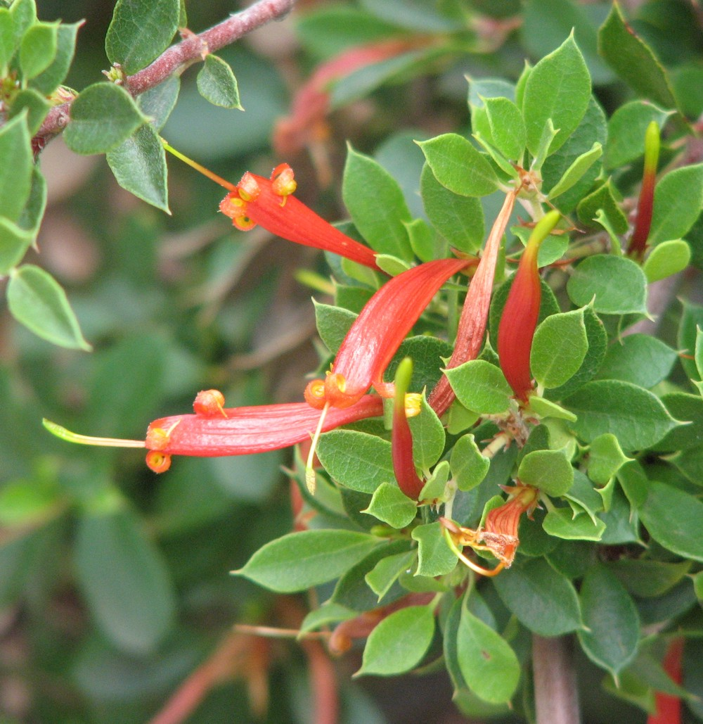 Lambertia uniflora? (labelled as Lambertia multiflora) Maranoa Gardens, Balwyn, Victoria, Australia